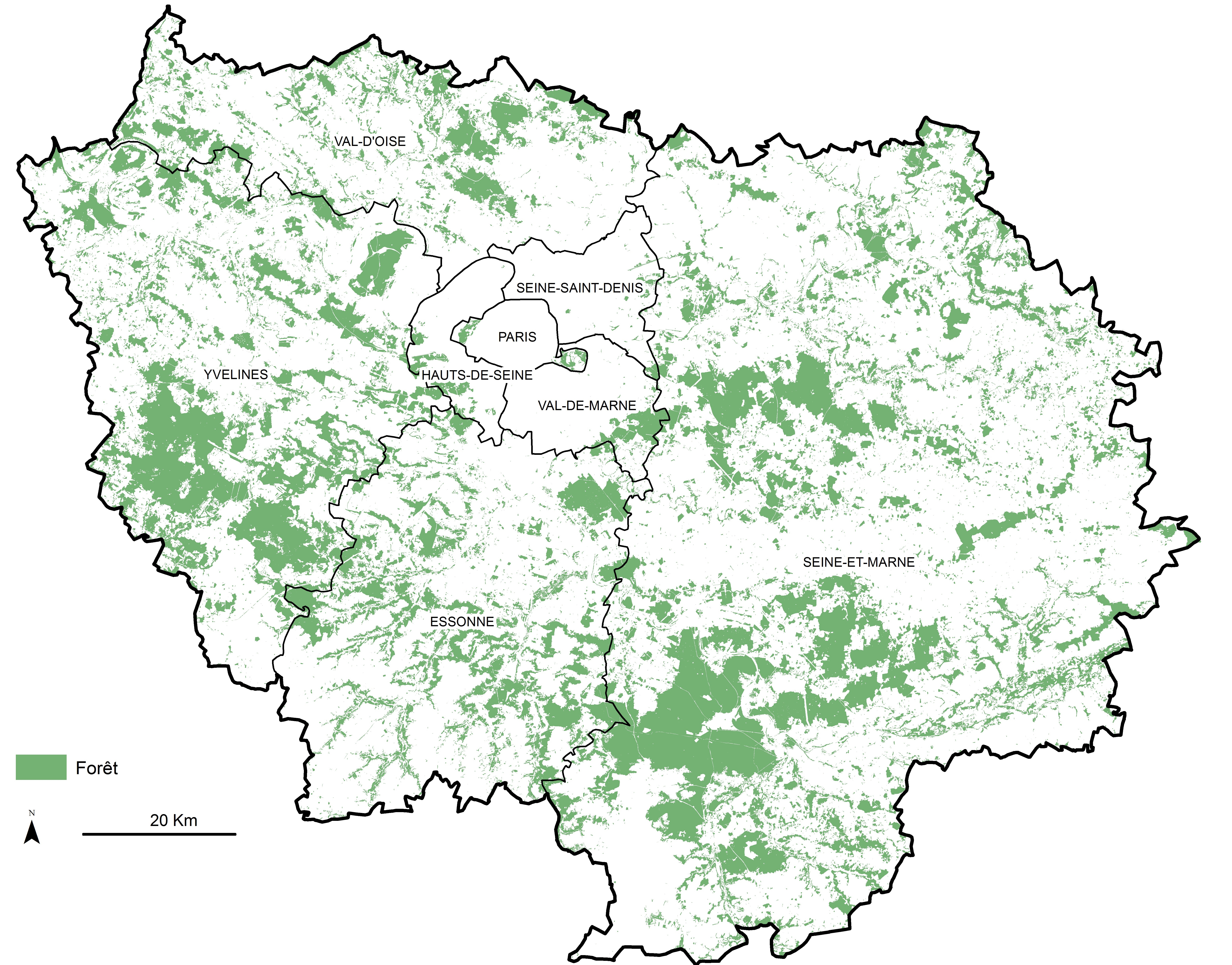 Carte boisement ile de France 2010